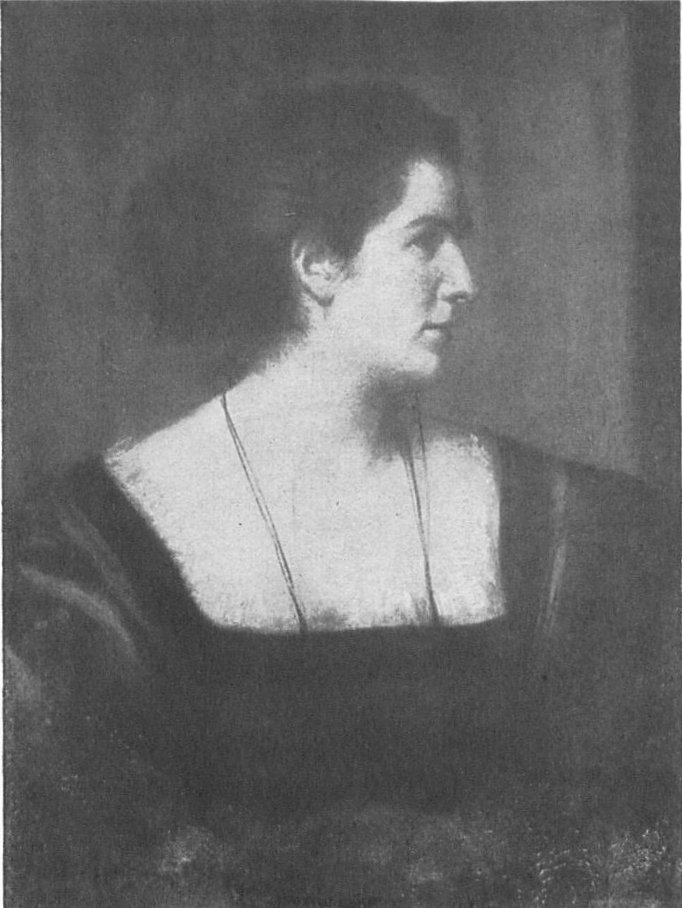 Rosalie Braun-Artaria. In: Von berühmten Zeitgenossen : Lebenserinnerungen einer Siebzigerin ; mit 2 Bildern d. Verf. nach d. Orig. von Franz v. Lenbach u. Anselm Feuerbach / von R[osalie] Braun-Artaria. 2., unveränd. Aufl München : Beck, 1918